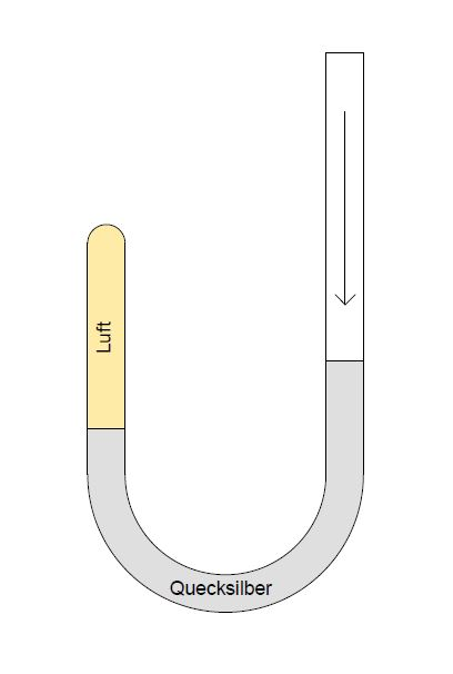 Boyle-Meriotte-Versuchsaufbau